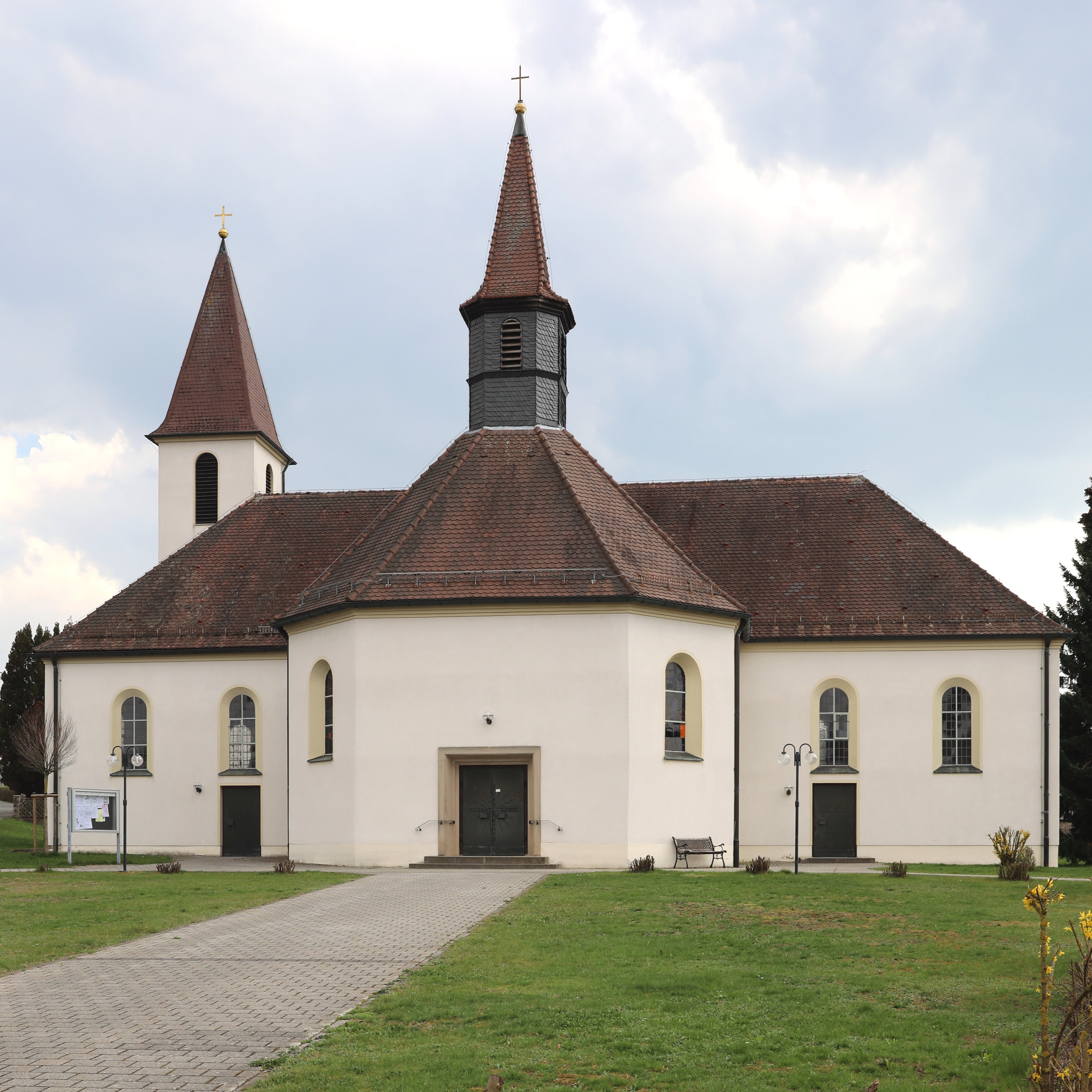 katholische Kirche Heilig Kreuz in Reitsch